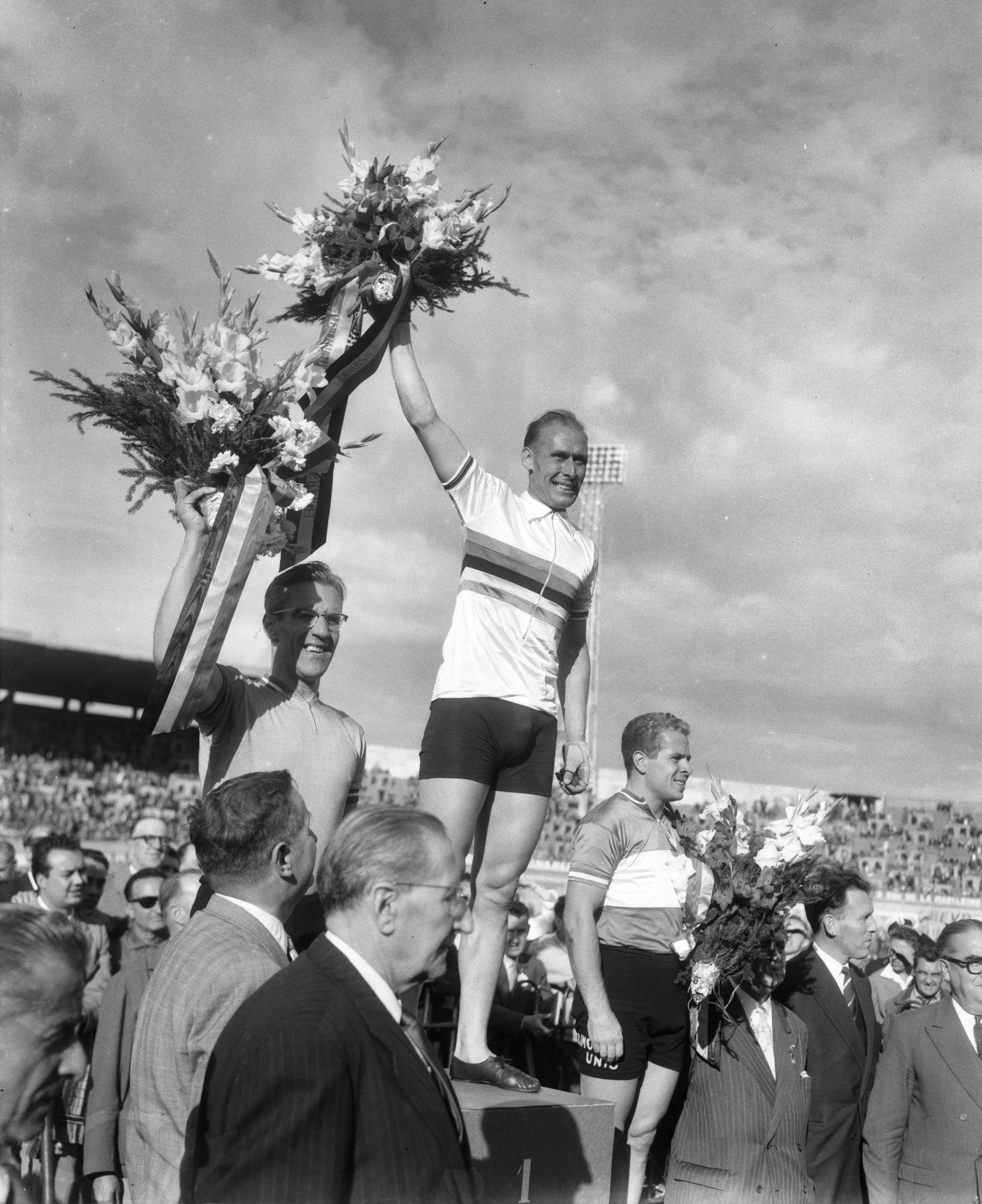 Collectie / Archief : Fotocollectie Anefo Reportage / Serie : [ onbekend ] Beschrijving : Wereldkampioenschappen wielrennen te Luik. Huldiging sprint, v.l.n.r. Van Vliet; Derksen; Gaignard Datum : 11 augustus 1957 Locatie : Luik Trefwoorden : baan, sport, wielrennen Persoonsnaam : Derksen Jan, Gaignard Roger, Vliet, Arie van Fotograaf : Pot, Harry / Anefo Auteursrechthebbende : Nationaal Archief Materiaalsoort : Negatief (zwart/wit) Nummer archiefinventaris : bekijk toegang 2.24.01.04 Bestanddeelnummer : 908-8529